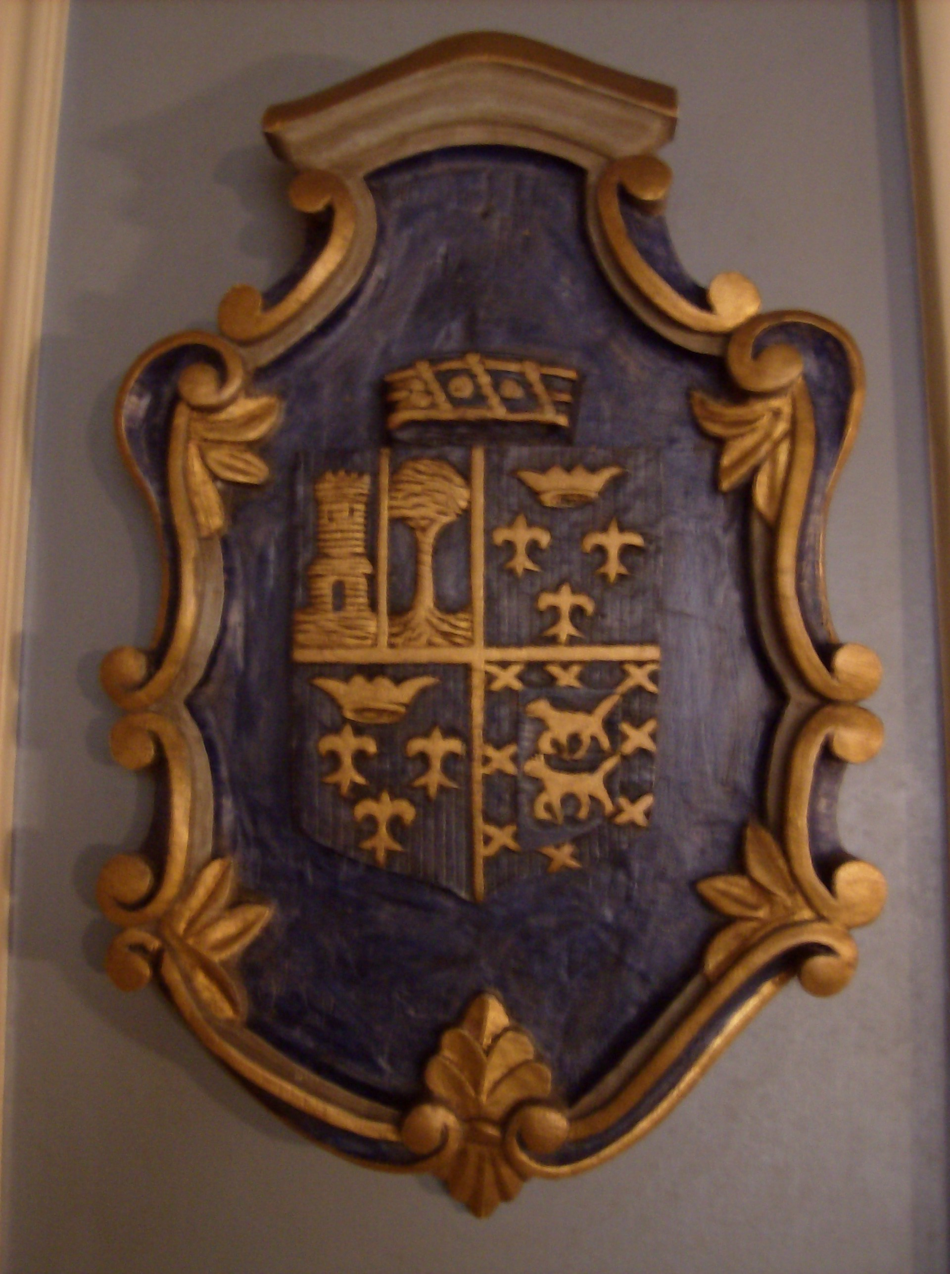 placa de madeira azul com brasão esculpido